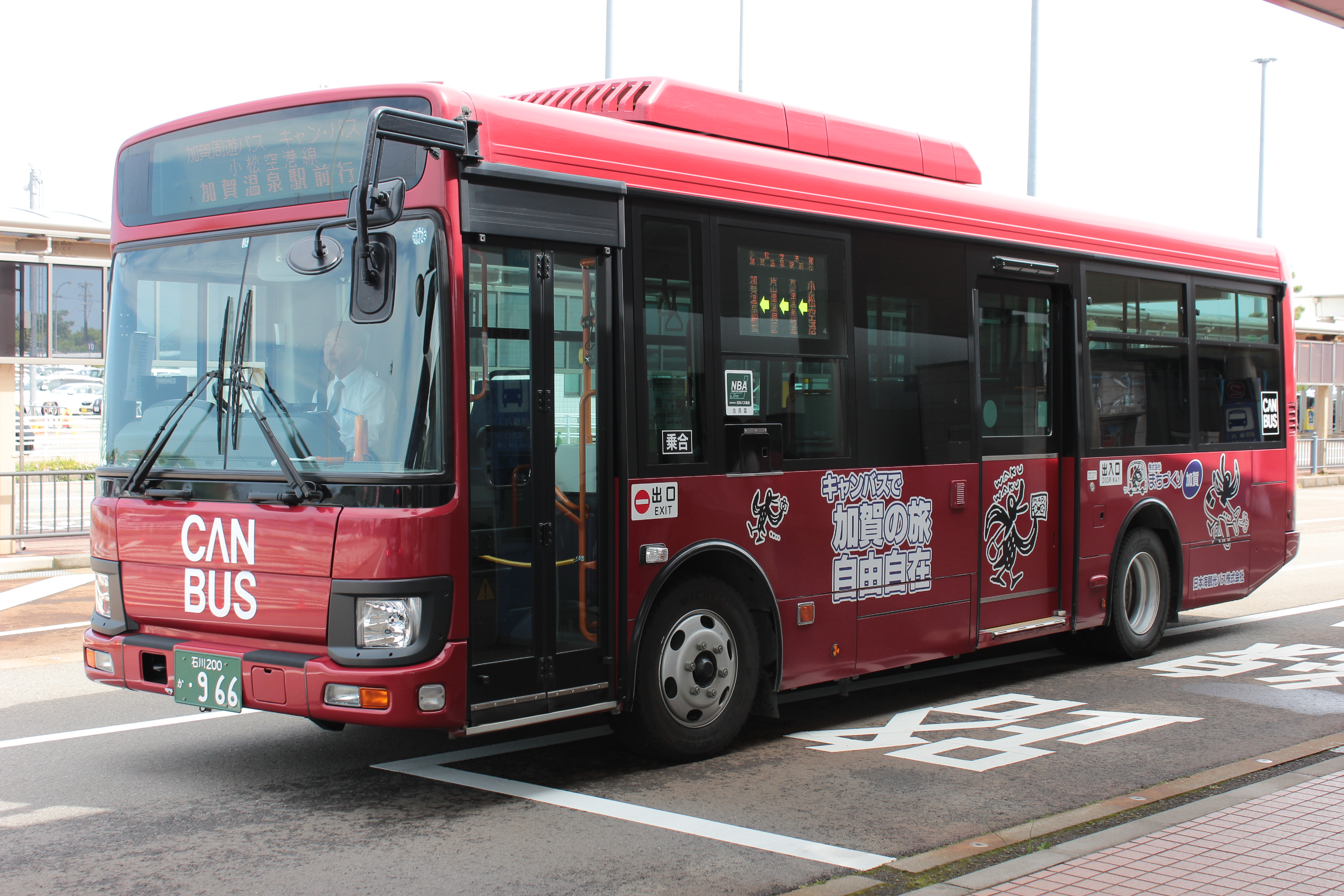 加賀周遊バス キャン・バスの小松空港線で使用される車両。 Canon EOS Kiss X5